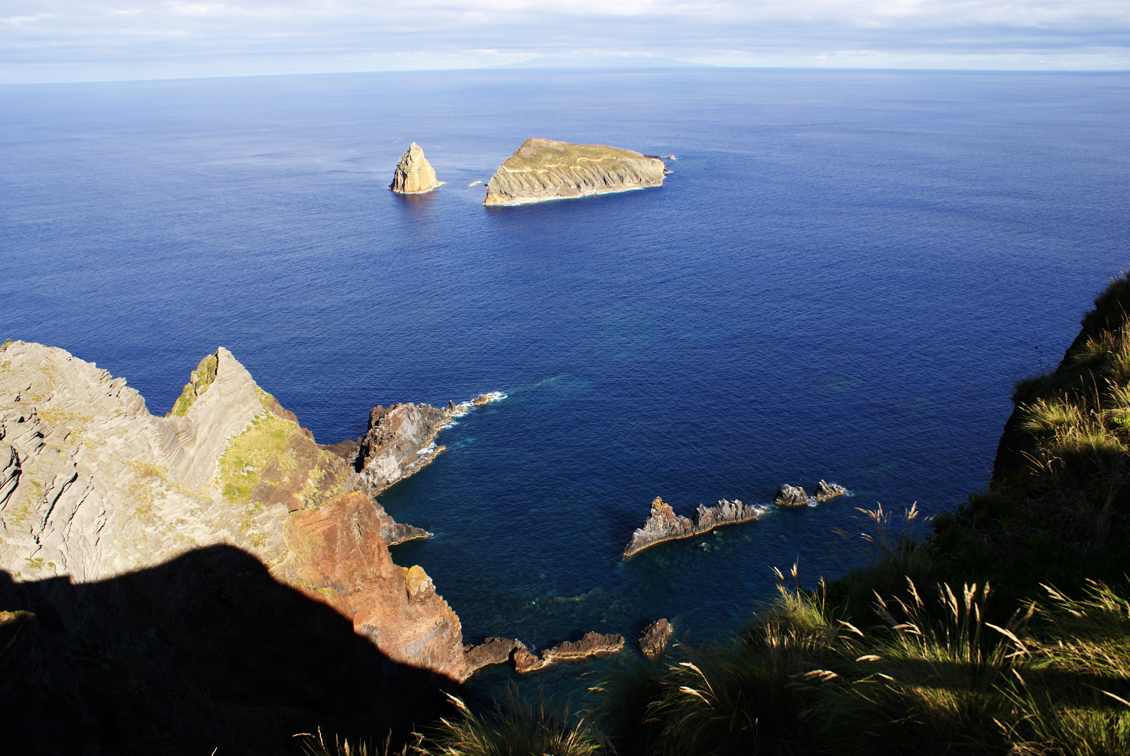 Ilhéu de Baixo visto do cimo da Ponta da Restinga, Santa Cruz da Graciosa, ilha Graciosa, Açores, Portugal